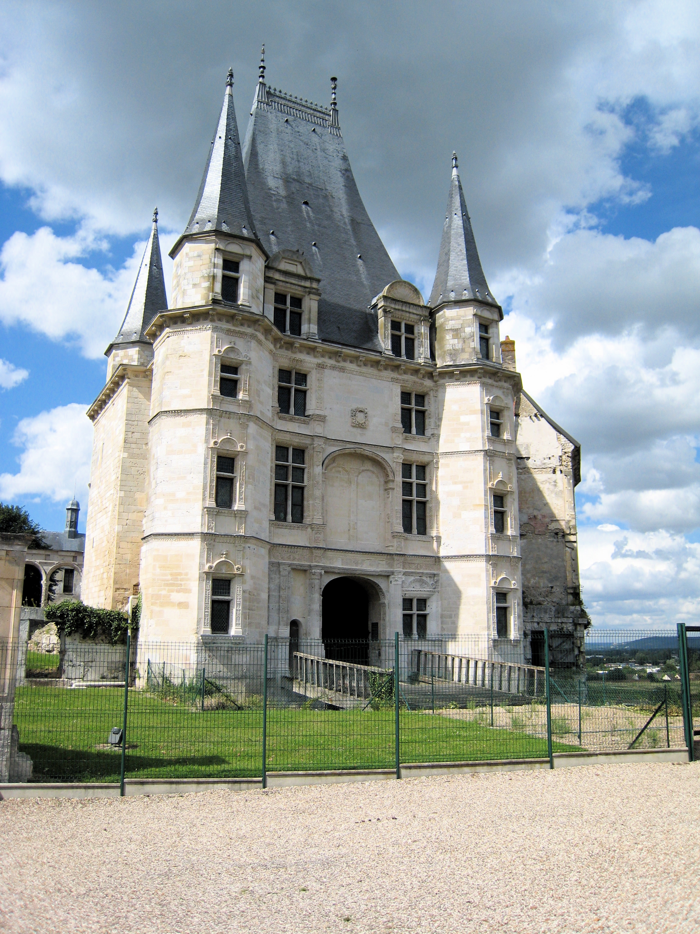 Le Château de Gaillon, Eure (27), France